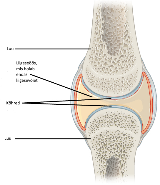 Liigese ehitus, kõhred mis katavad luude pinda, kaitstes neid kulumise eest. Liigeseõõs mis hoiab endas liigesevõiet, mis vähendab hõõrdumist.